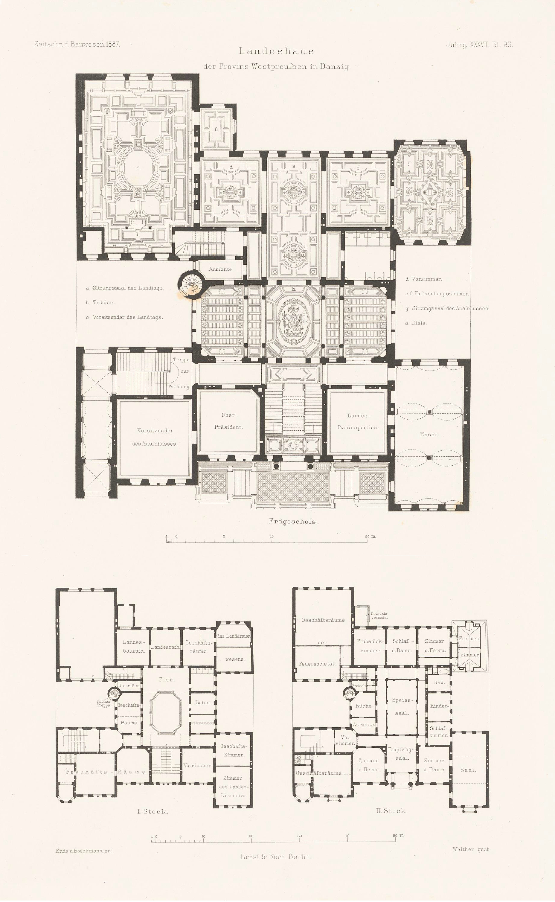 Pläne des Landeshauses der Provinz Westpreußen in Danzig, später Volkstagsgebäude, abgedruckt in der Zeitschrift für Bauwesen 1887